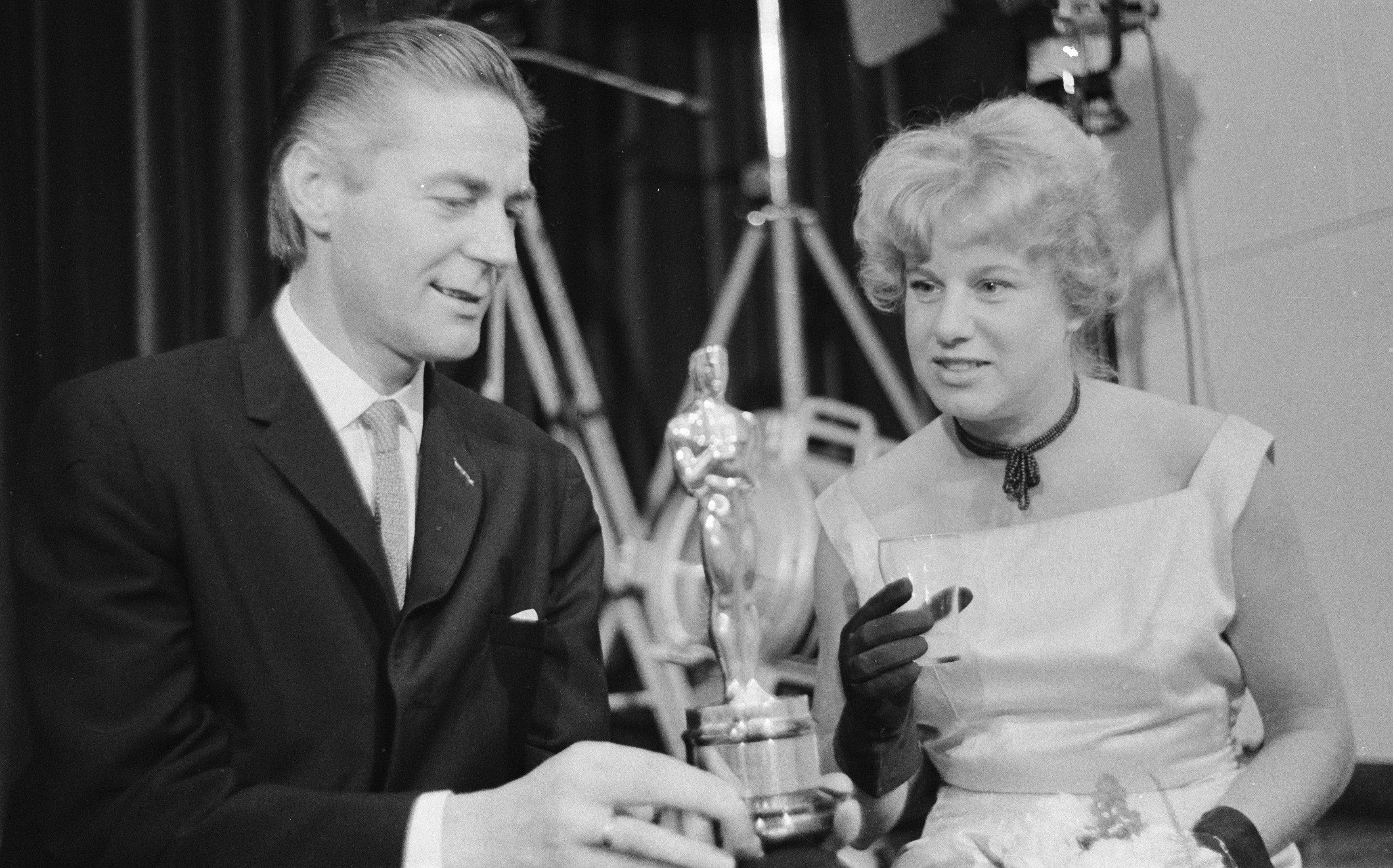 Collectie / Archief : Fotocollectie Anefo Reportage / Serie : [ onbekend ] Beschrijving : Uitreiking "Oscar" aan Bert Haanstra door Amerikaanse ambassadeur Ph. Young Datum : 16 juni 1960 Trefwoorden : Uitreikingen, ambassadeurs Persoonsnaam : Haanstra, Bert, Young, Ph. Fotograaf : Pot, Harry / Anefo Auteursrechthebbende : Nationaal Archief Materiaalsoort : Negatief (zwart/wit) Nummer archiefinventaris : bekijk toegang 2.24.01.05 Bestanddeelnummer : 911-3433 Reacties Geplaatst door Televisiefan op 30 juli 2017 - 16:07. Dame mogelijk zijn echtgenote Nita Haanstra-Wijtmans Locatie: Amerikaanse Ambassade Plaats: Den Haag, Zuid-Holland NB. Bert Haanstra kreeg de 'Oscar' voor de documentaire / film 'Glas'. Hij was de eerste Nederlander die een 'Oscar' in ontvangst mocht nemen.